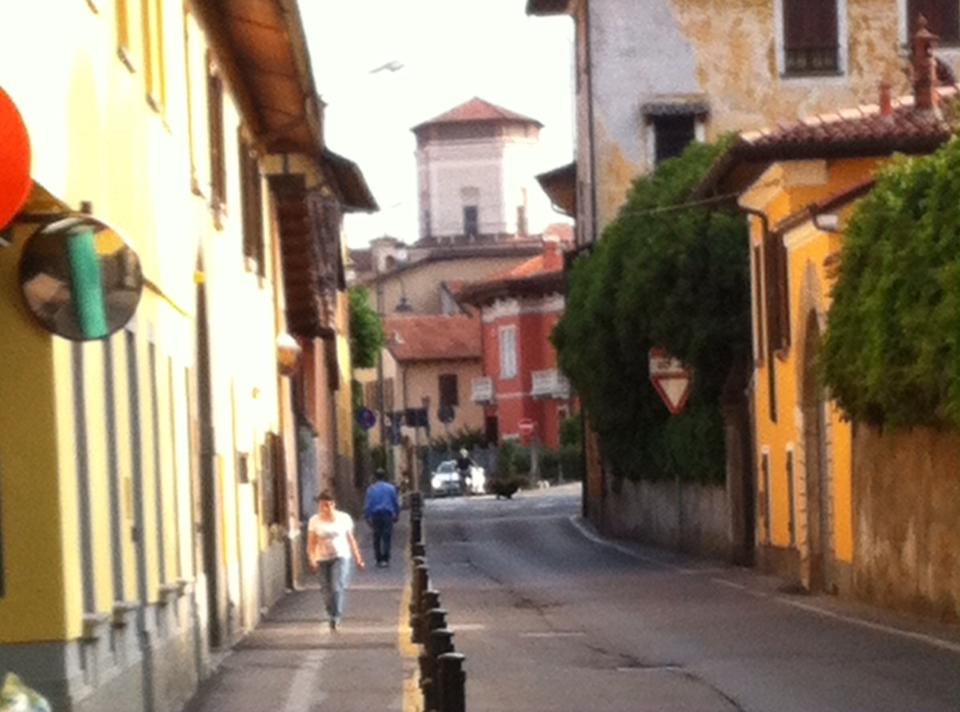 La cupola del Duomo di Chiari vista da Via Tagliata